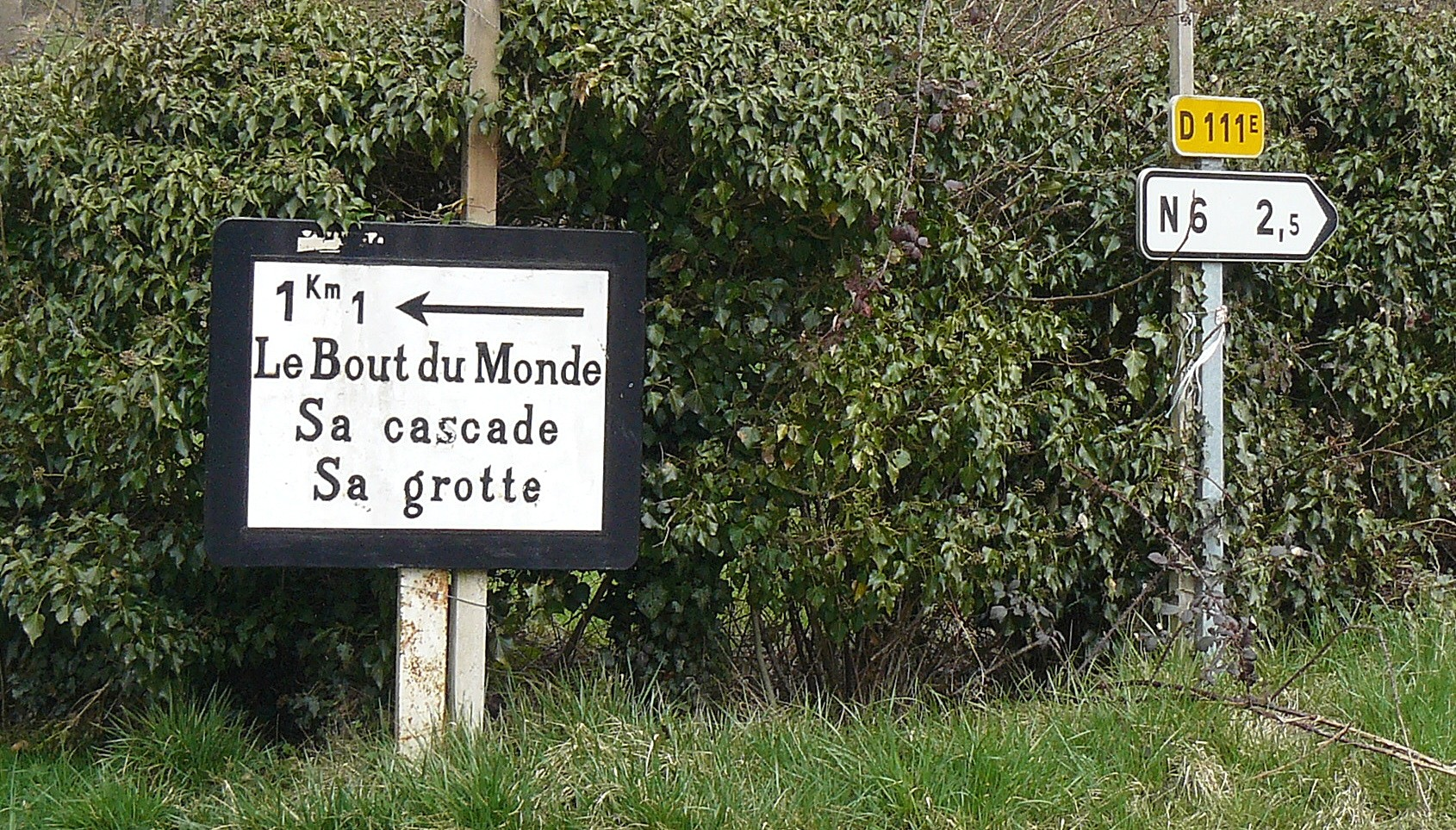 Le Cirque du Bout du Monde, à Vauchignon (Côte d'Or, France)